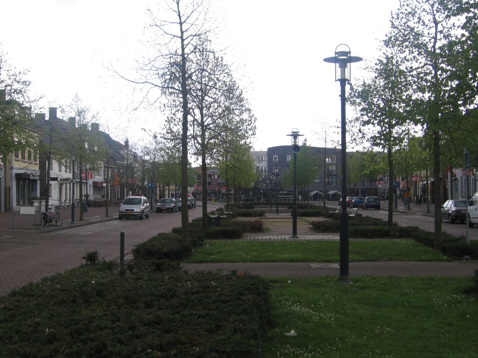 Etten-Leur, 30 april 2006